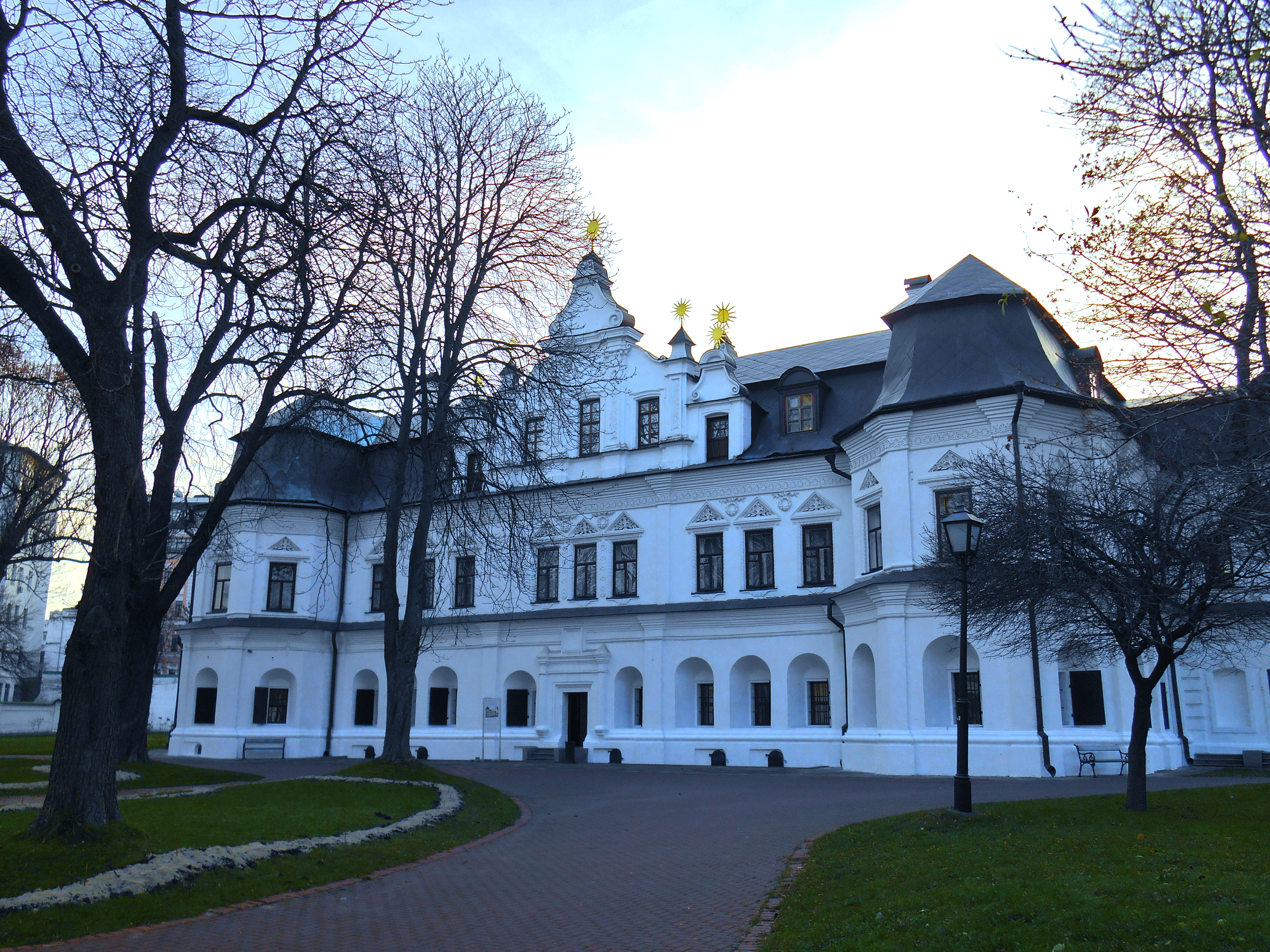 Будинок митрополита, Київ, Володимирська вул., 24